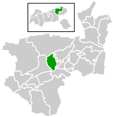 Lage der Gemeinde innerhalb des Bezirks Kufstein